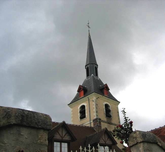 L'église de La-Chaussée-Saint-Victor